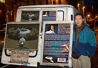 Image Specific